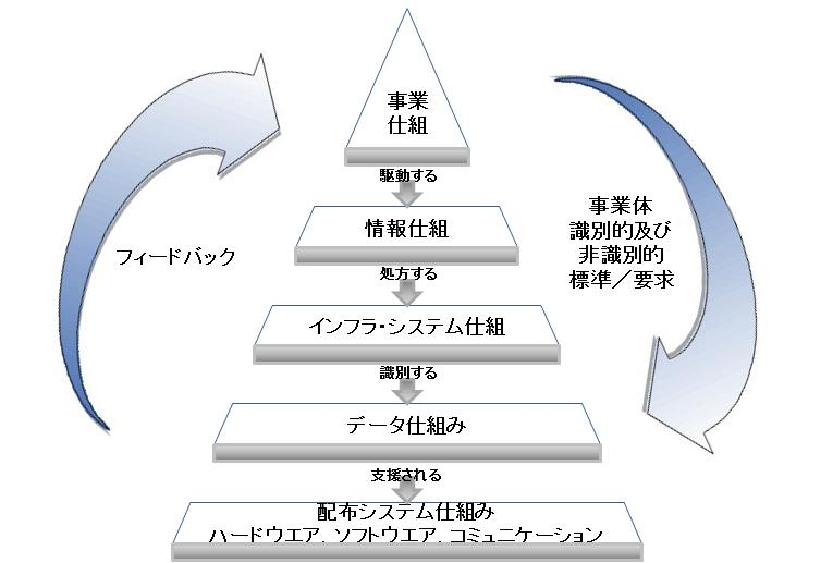 NIST Enterprise Architecture Model